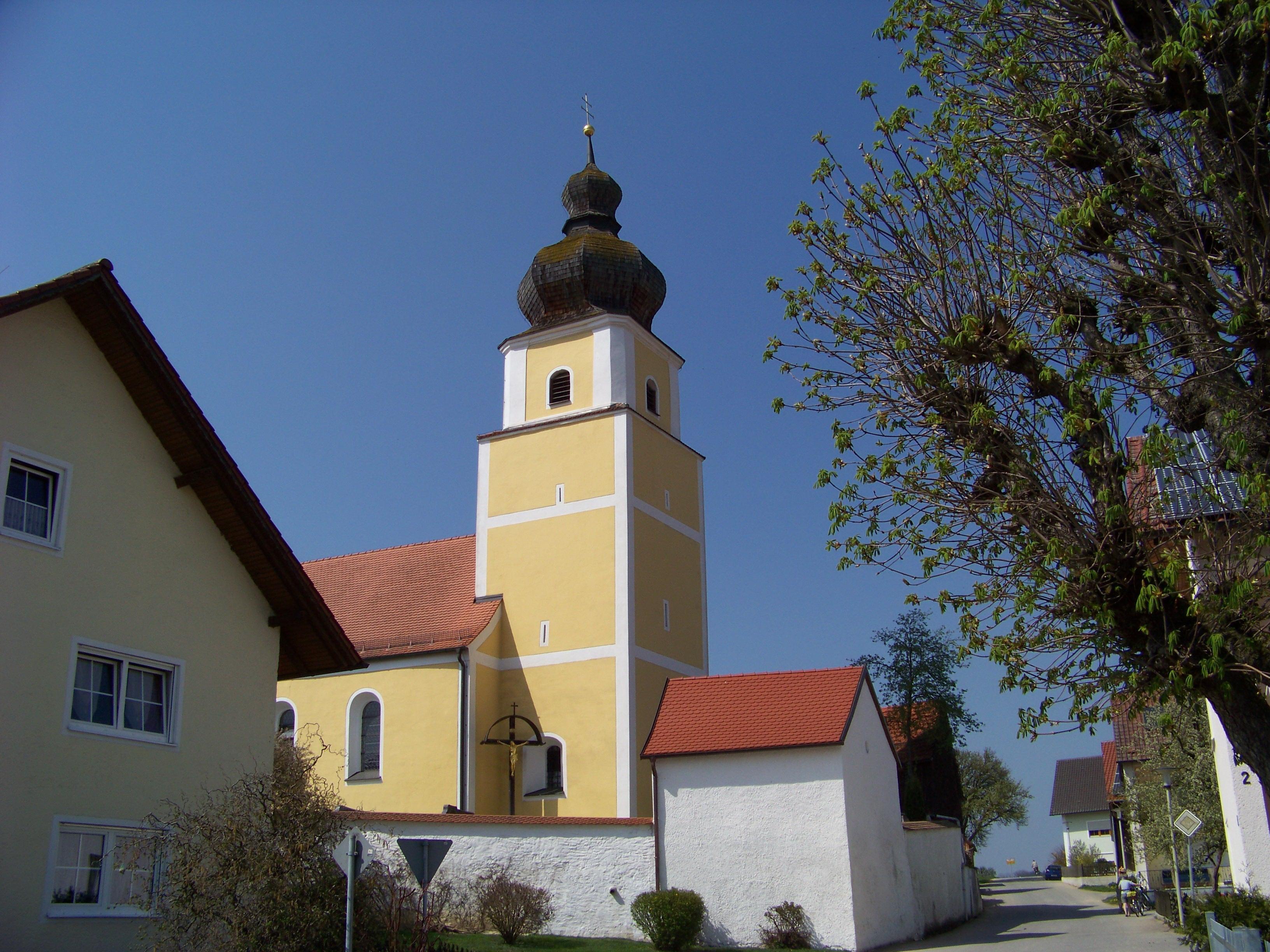 Rogging. Katholische Filialkirche St. Johannes Ev. und St. Johannes Bapt., Saalkirche mit Satteldach, Chorturm und Zwiebelhaube und Vorzeichen, romanisch, um 1700 umgestaltet; mit Ausstattung; Friedhofsmauer, Bruchstein, wohl 17./18. Jahrhundert